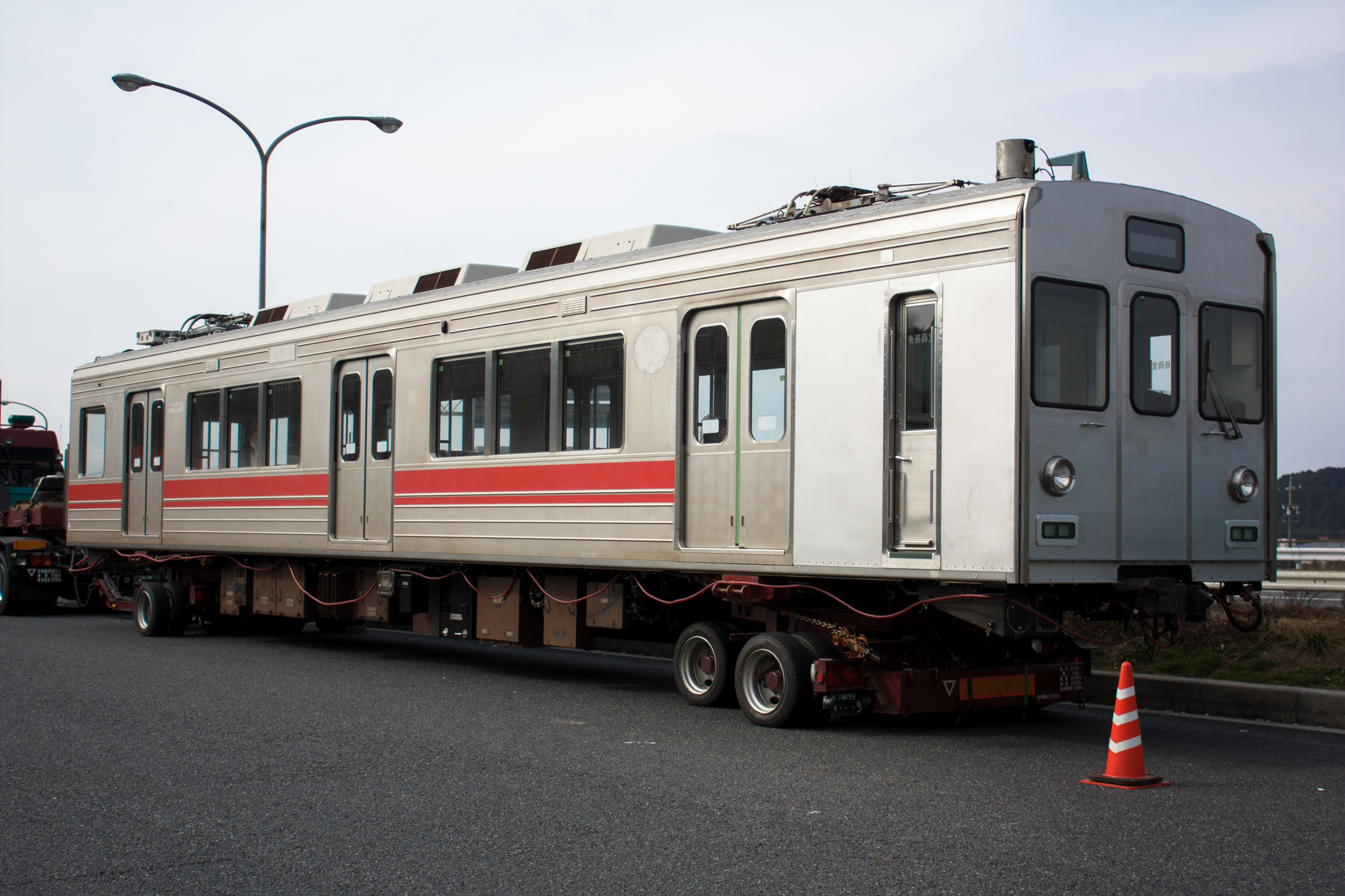 20110208 伊賀SA 現：伊賀鉄道200系